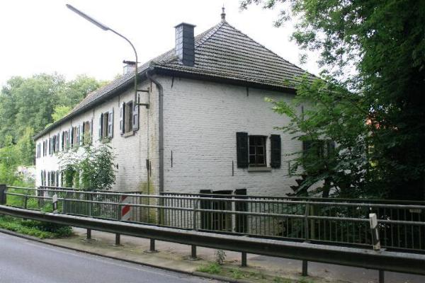 Die Schrofmühle in Wegberg-Rickelrath